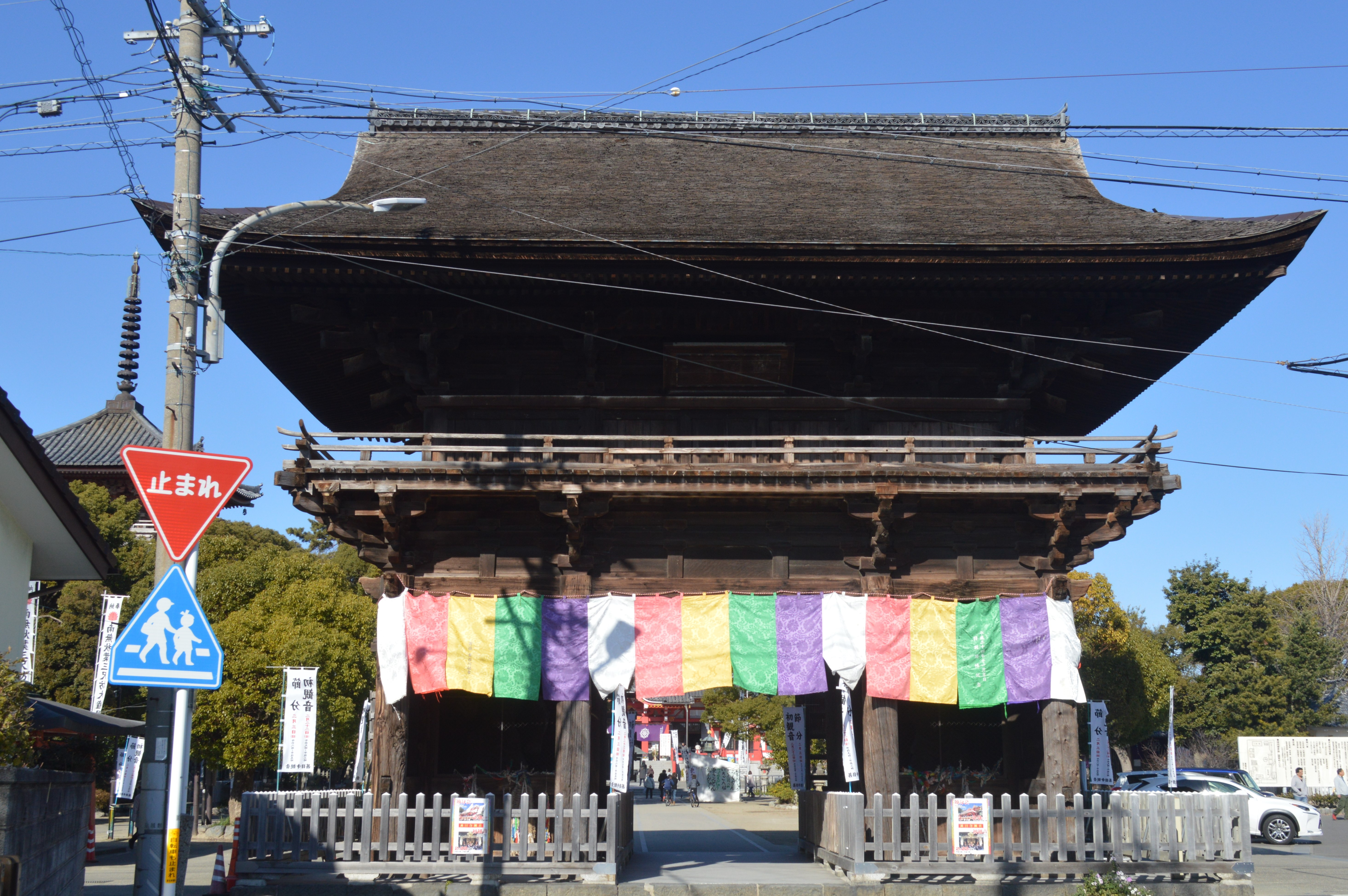 愛知県あま市にある甚目寺。南大門（仁王門）。重要文化財。